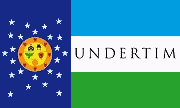 Flag of East Timorese party União Nacional Democrática de Resistência Timorense UNDERTIM